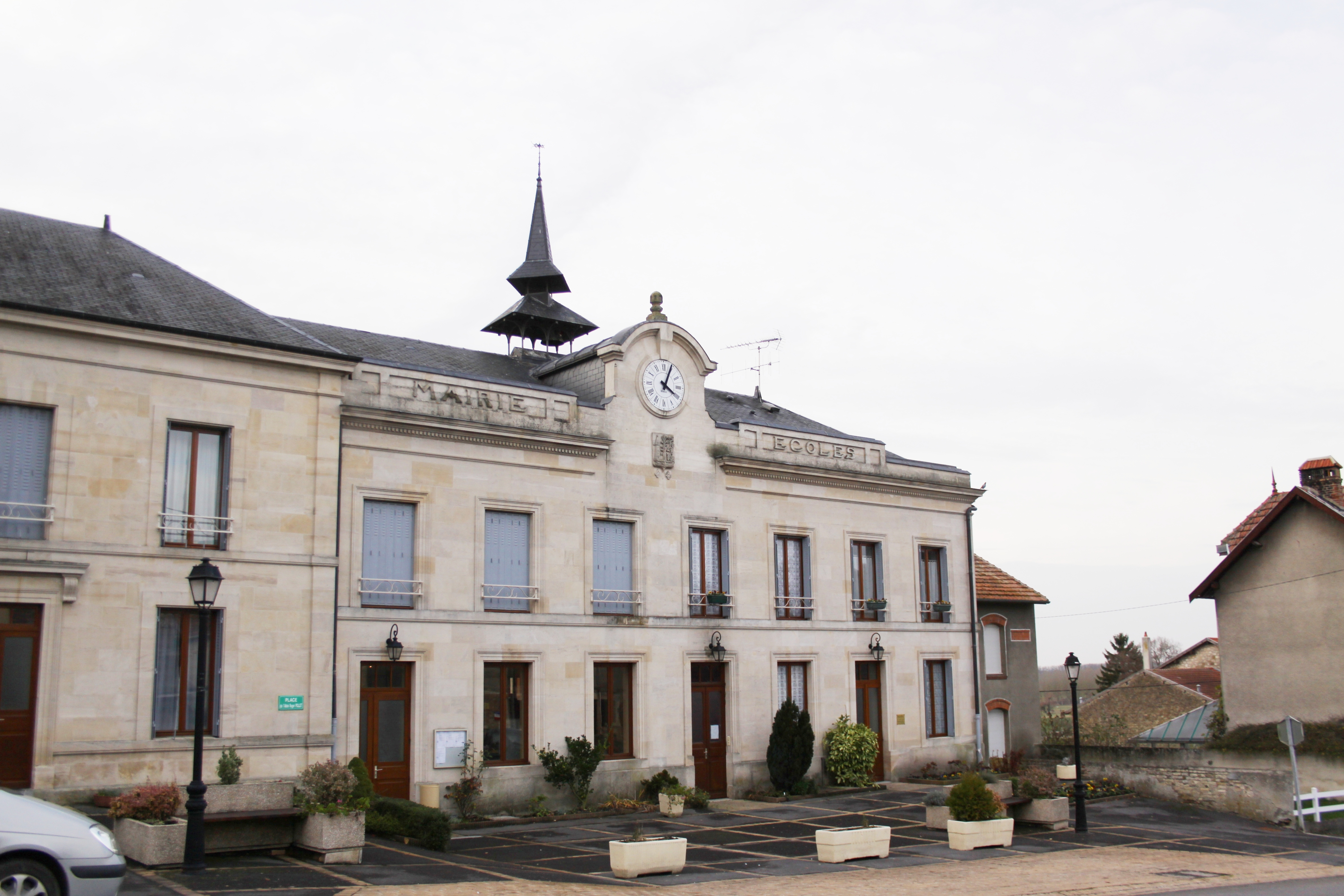 Village Ardennais